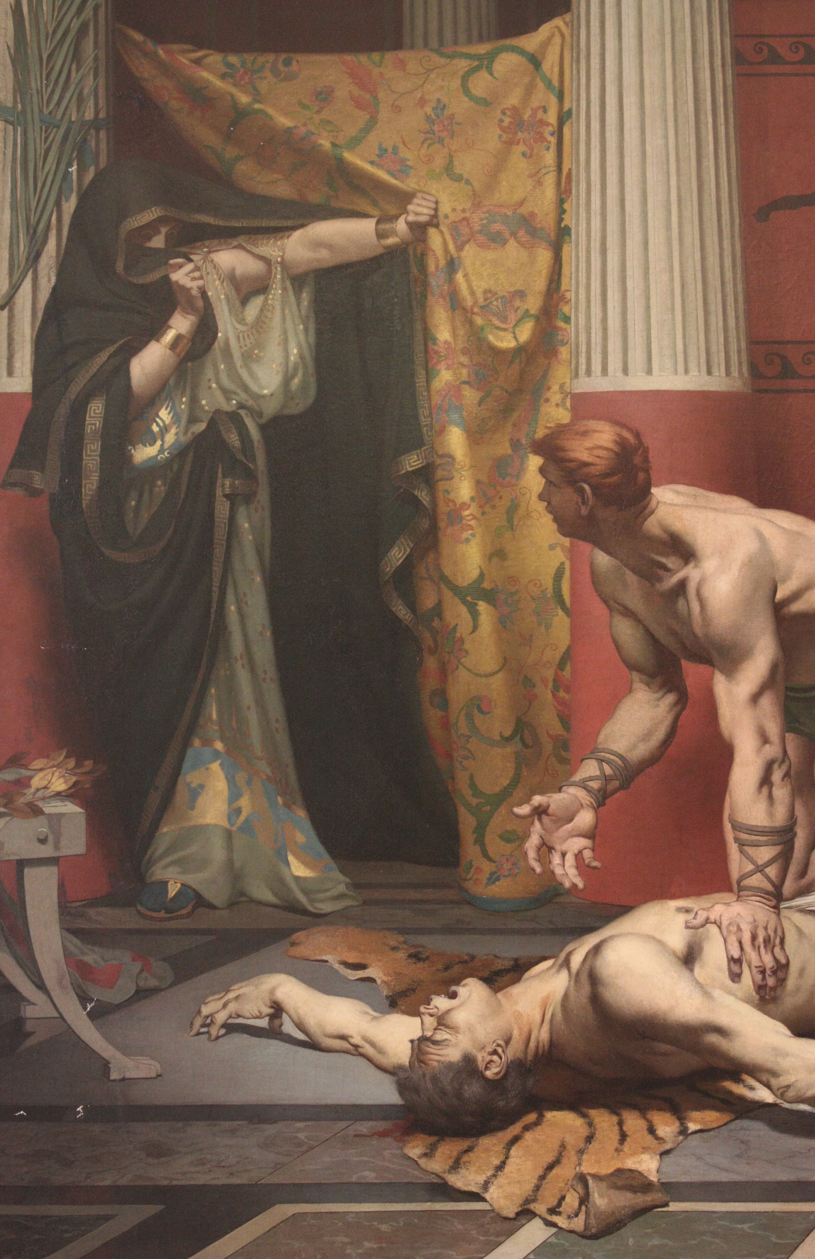 Détail de "La Mort de Commode" par Fernand Pelez, 1879. Assassinat de l'empereur Commode, commandité par sa maîtresse Marcia (fa femme se cachant sous son voile).